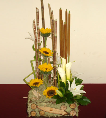 Diseño floral con Girasoles (heliantus annus), Eneas (typa agustifolia) y Casablancas (Lirio longiflorum) y accesorios de detalle.